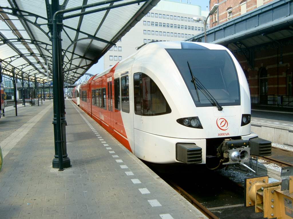 De GTW (Spurt) van Arriva op Station Groningen. Arriva zet ze in op alle noordelijke nevenlijnen en tussen Geldermalsen en Dordrecht